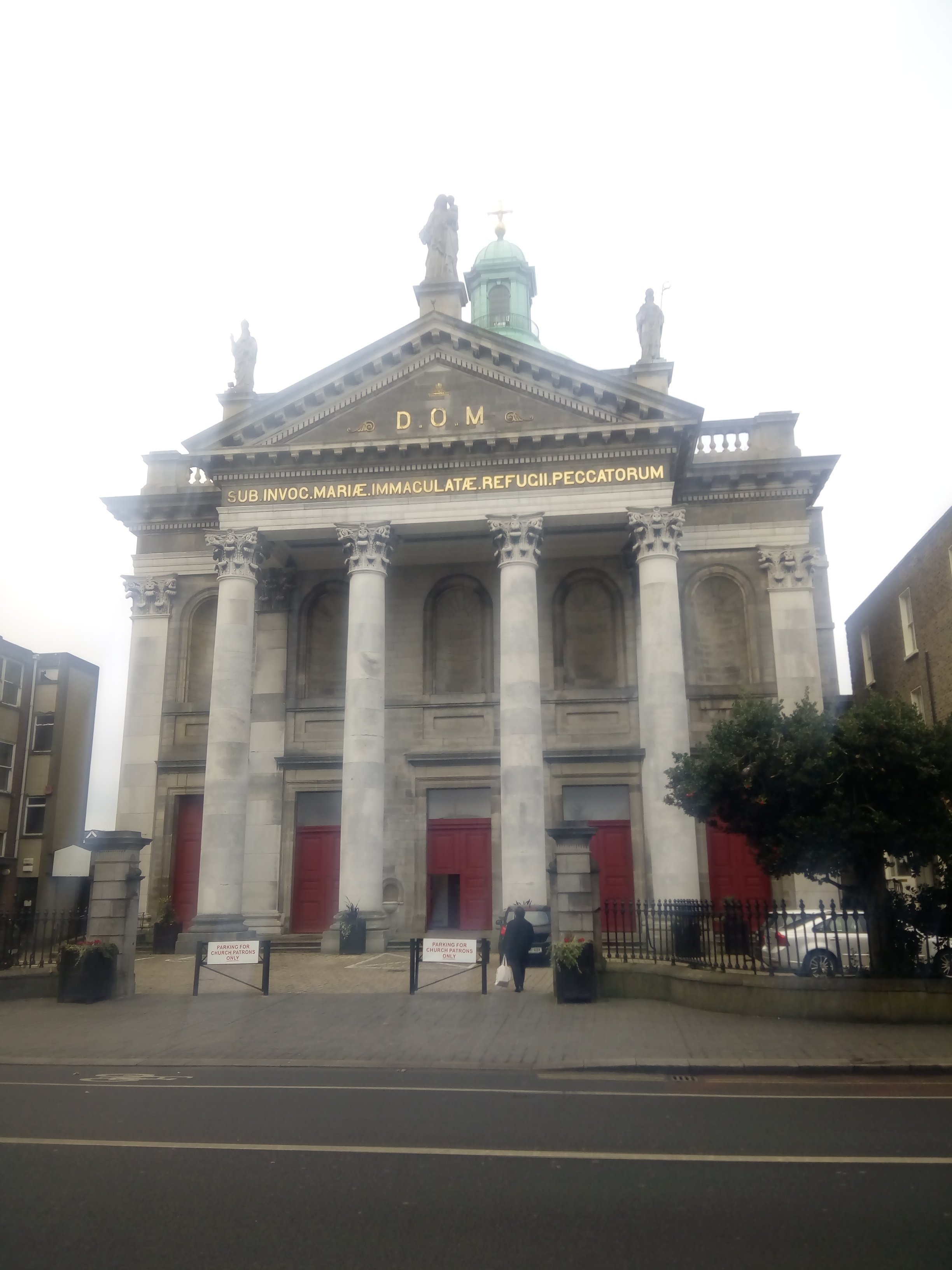 chiesa Church of Mary immaculate Dublino